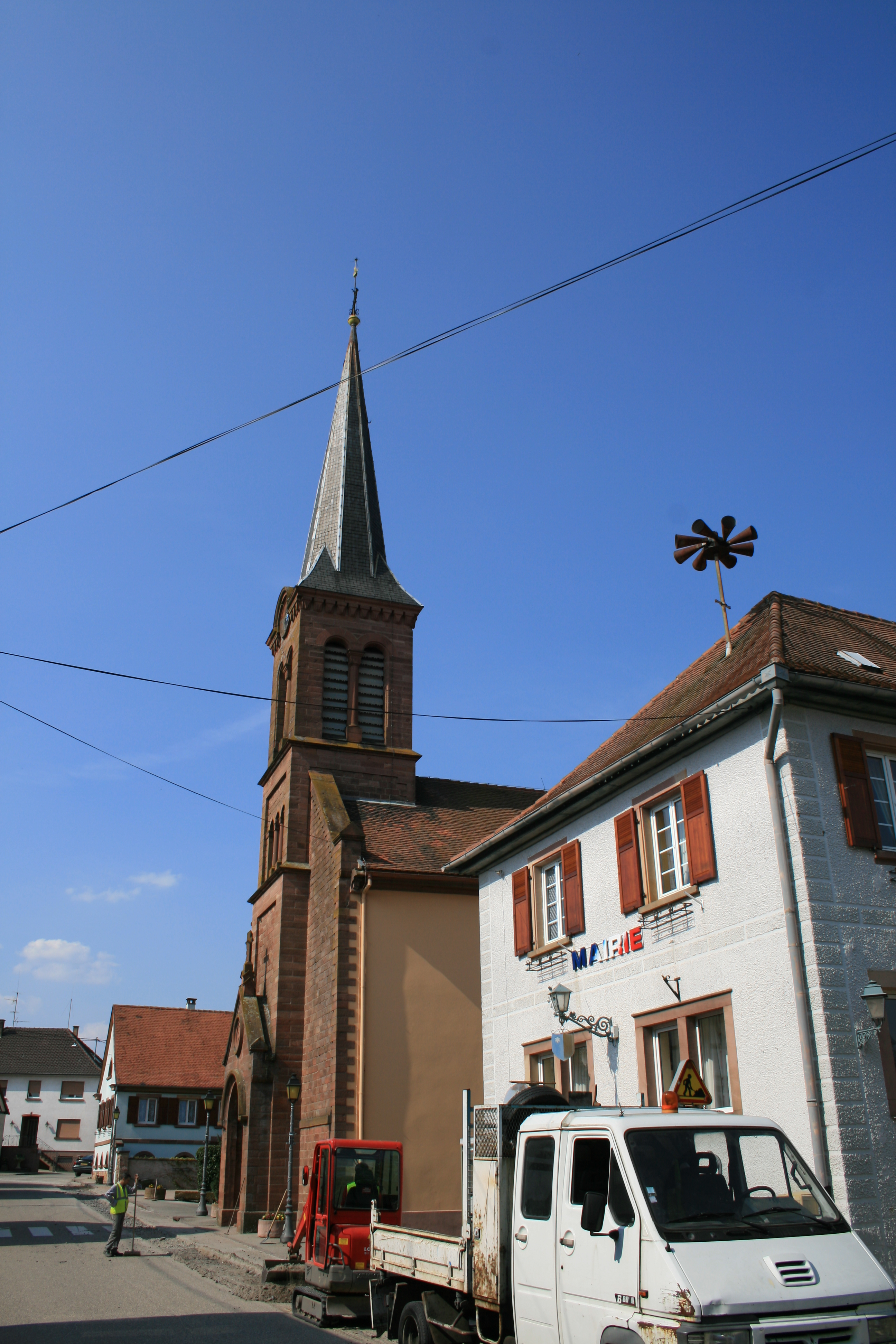 L'église Saint-Joseph de Dieffenbach-lès-Wœrth, Alsace